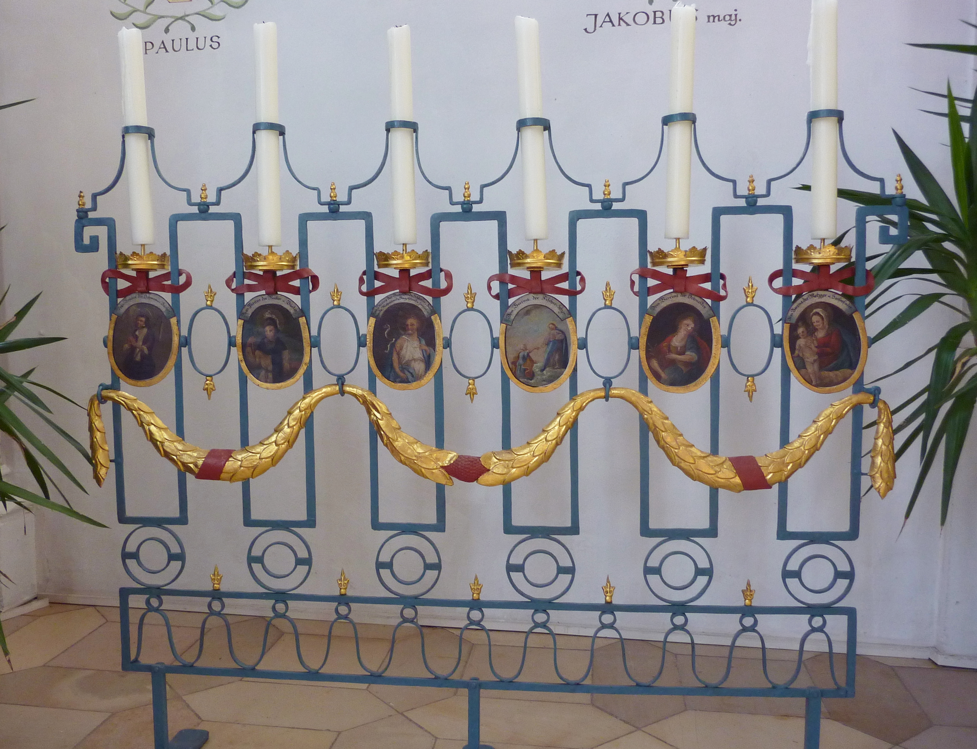 katholische Stadtpfarrkirche St. Martin in Gundelfingen an der Donau, Zunftgitter aus dem frühen 19. Jahrhundert